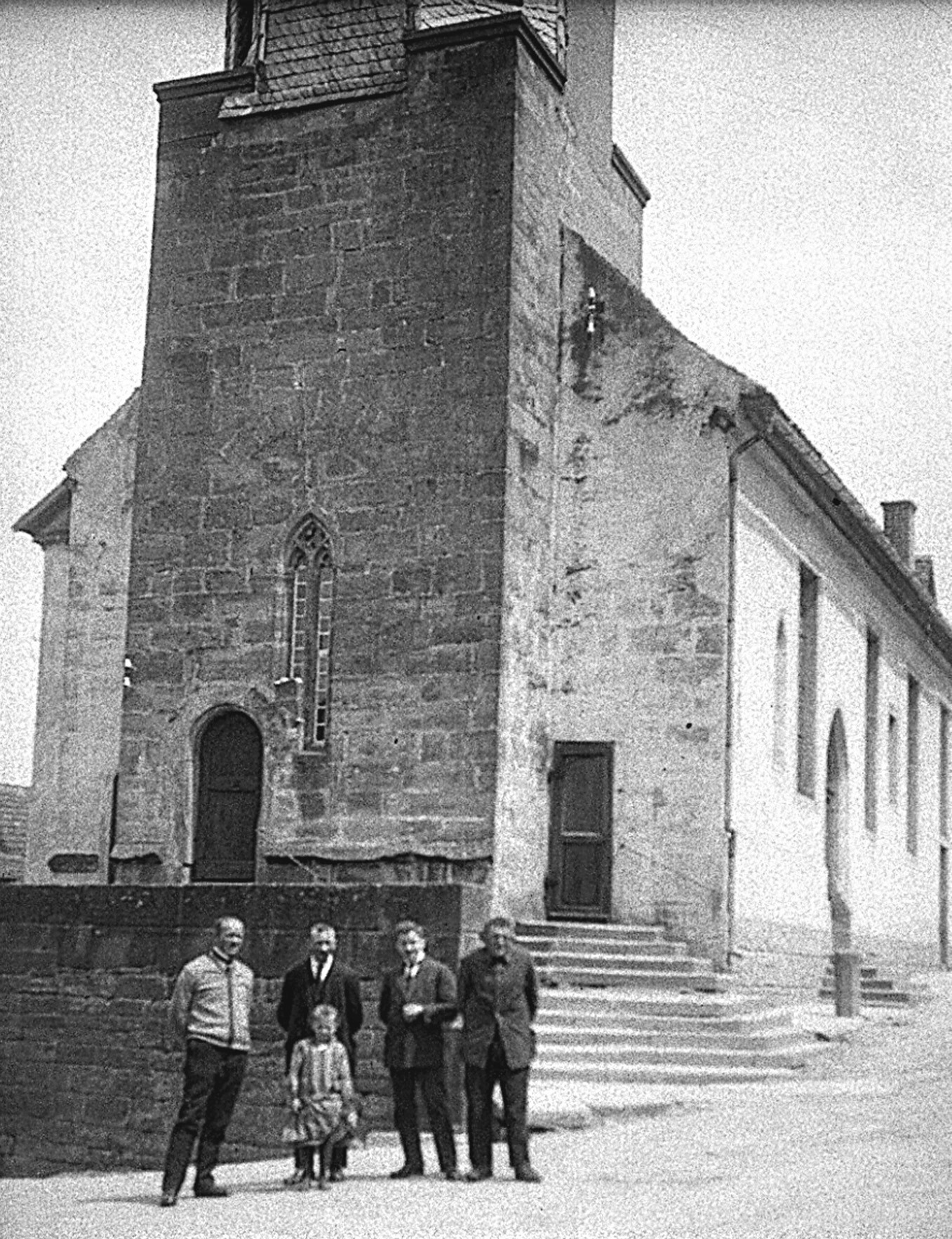 Cleebronn Raphaelskirche, Himmelfahrt 26. Mai 1927. Erst 1992 wurde die Kirche innen restauriert und der Chor wieder geöffnet.